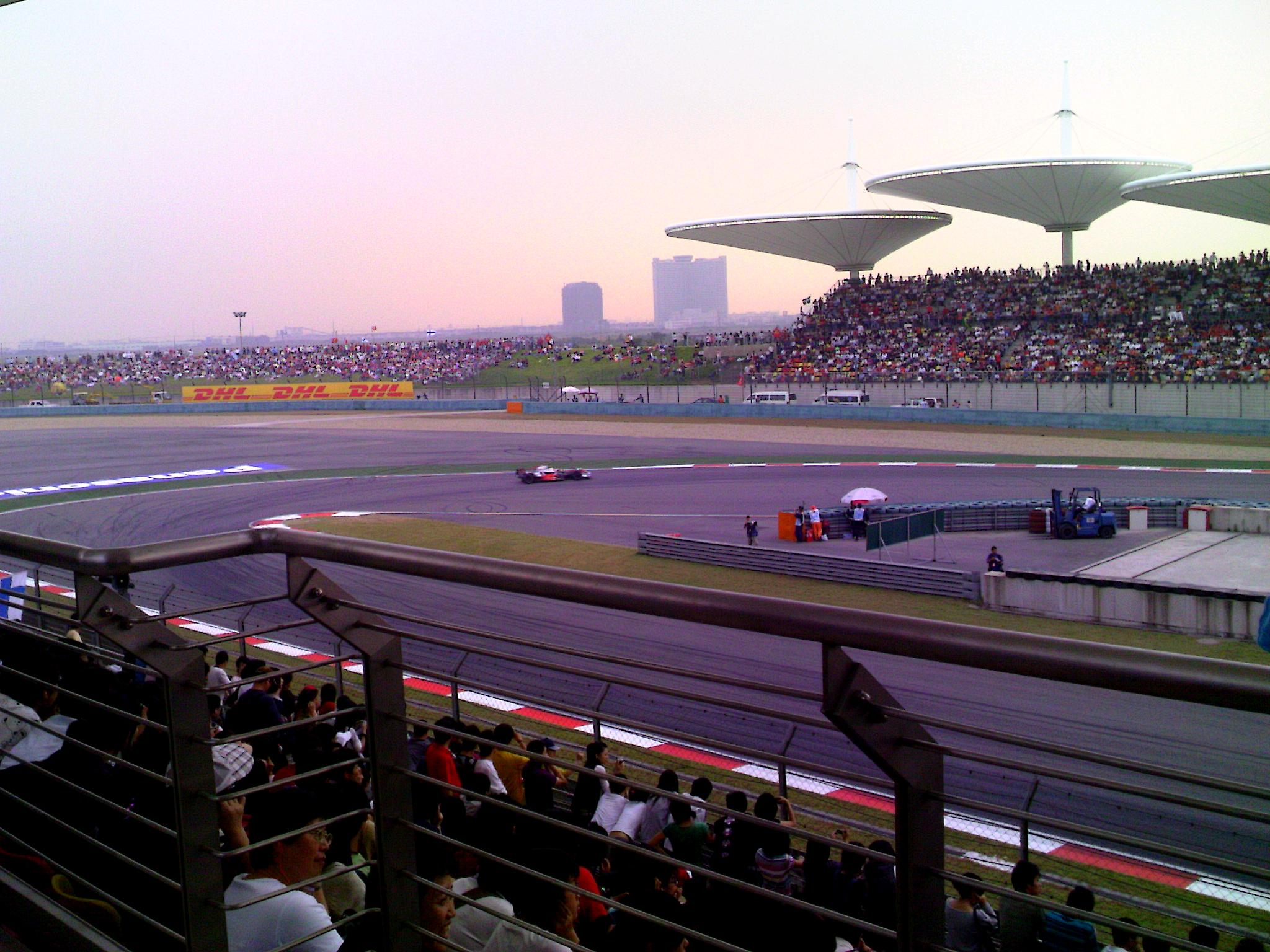 Hamilton, China 2008